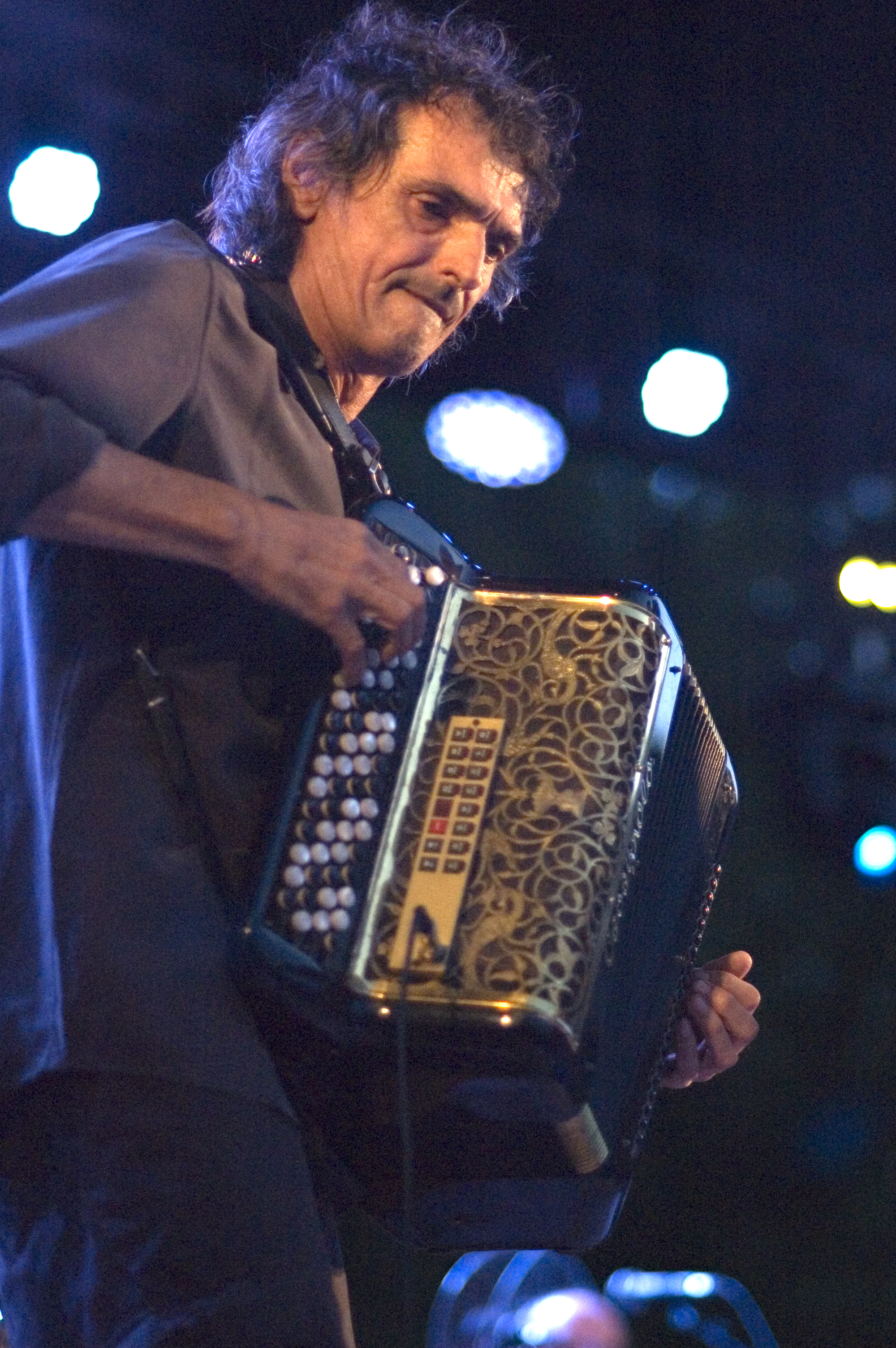 Niort 2011